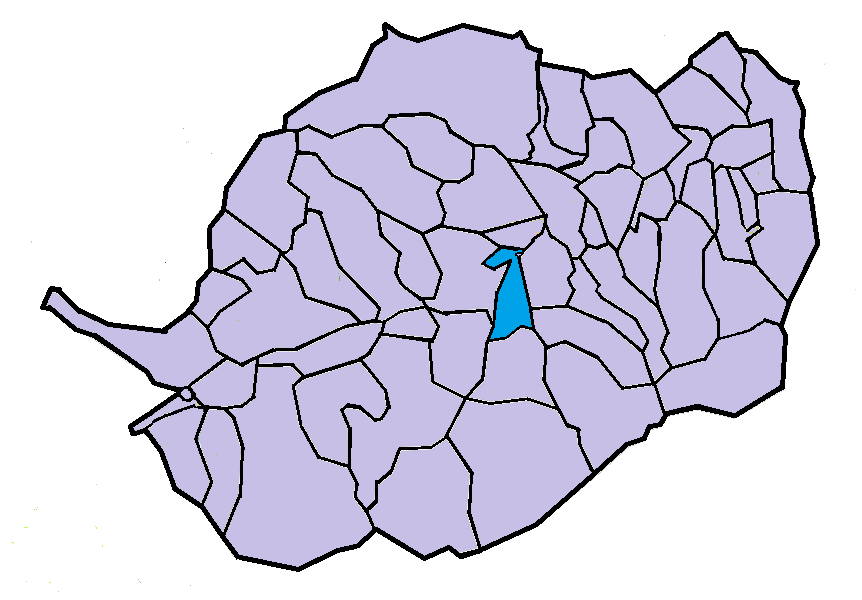 Fullà en el Conflent, a partir del mapa municipal del Conflent de lliure disposició adaptat al Nomenclàtor toponímic aprovat el 2007